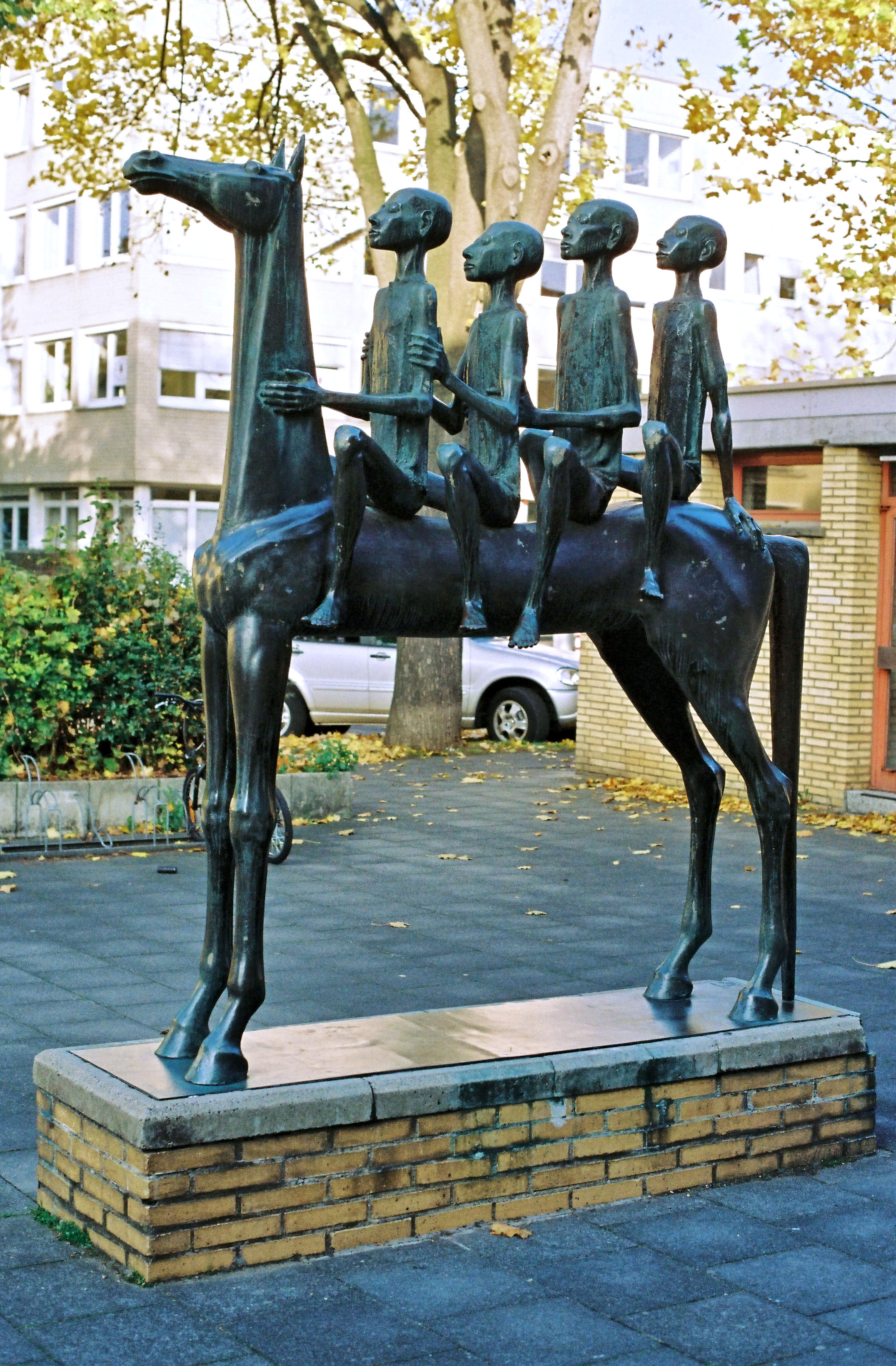 „Die vier Haimonskinder“, Figurengruppe aus Bronze auf Steinsockel, vor der Schule Geilenkircher Straße in Köln-Braunsfeld; 1969 geschaffen von dem deutschen Bildhauer Heinz Klein-Arendt (1916–2005) aus Bergheim-Oberaußem.